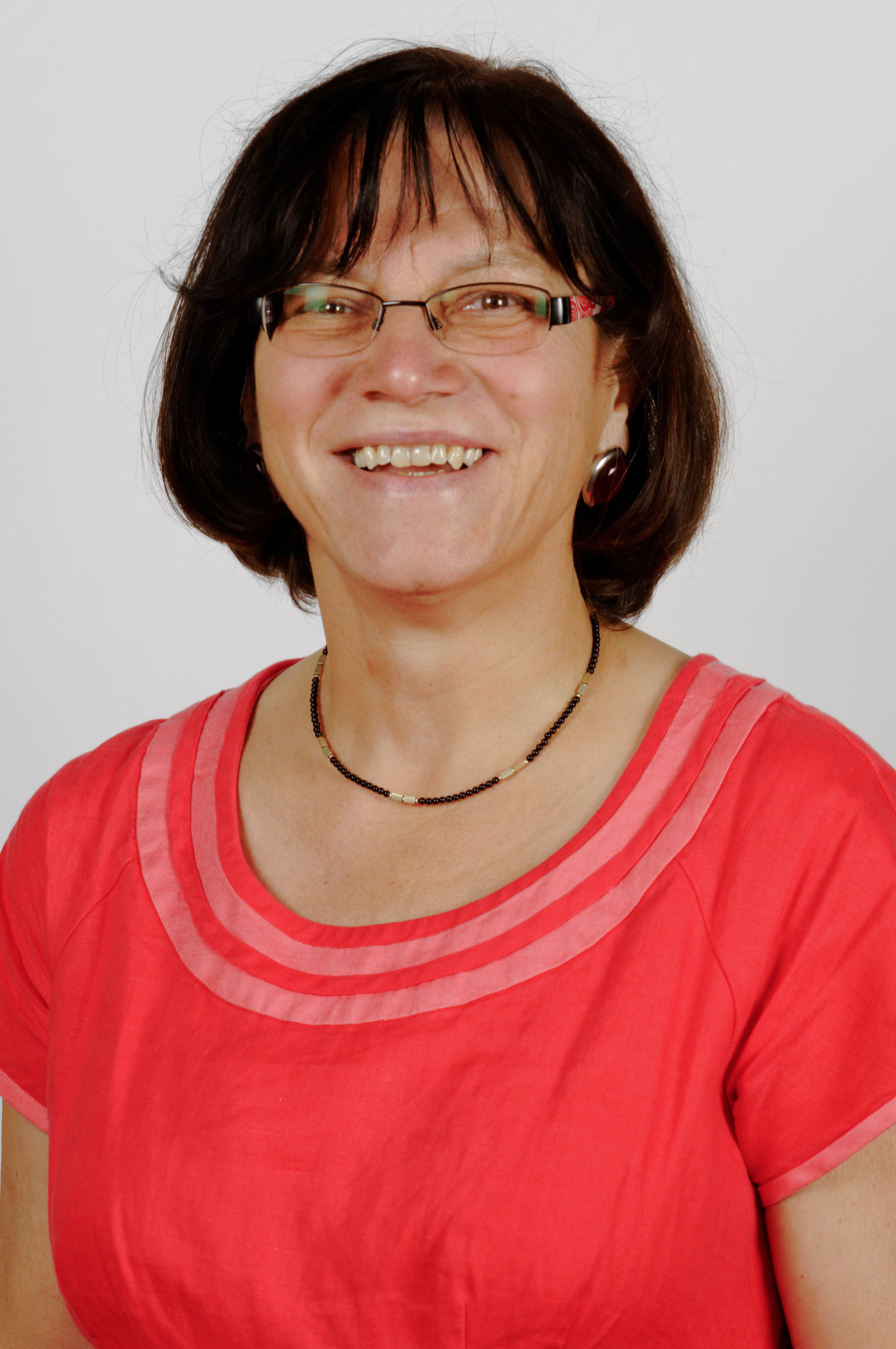 Landtagsprojekt Bayern